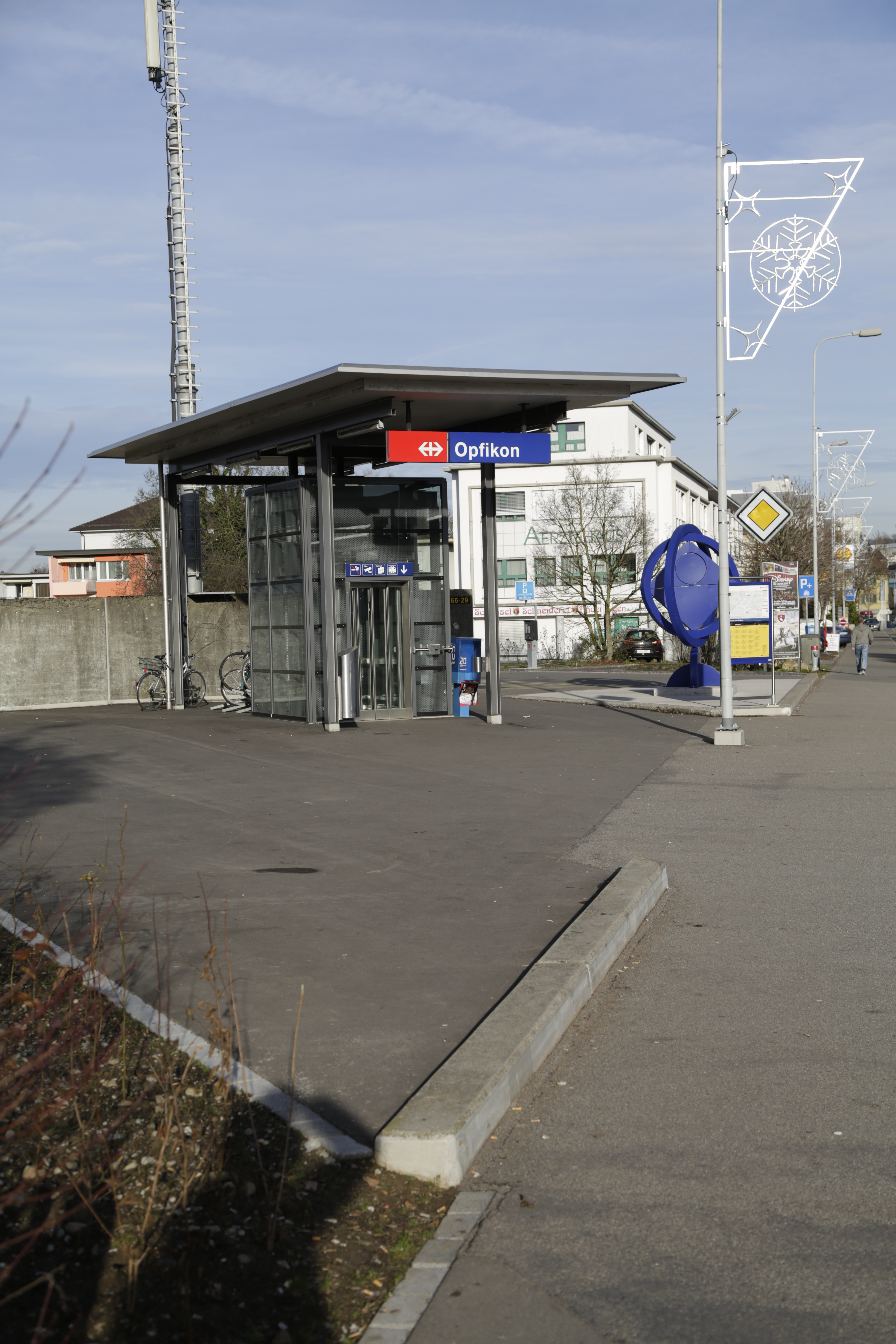 Impresionen von der der Haltestelle Opfiokon..